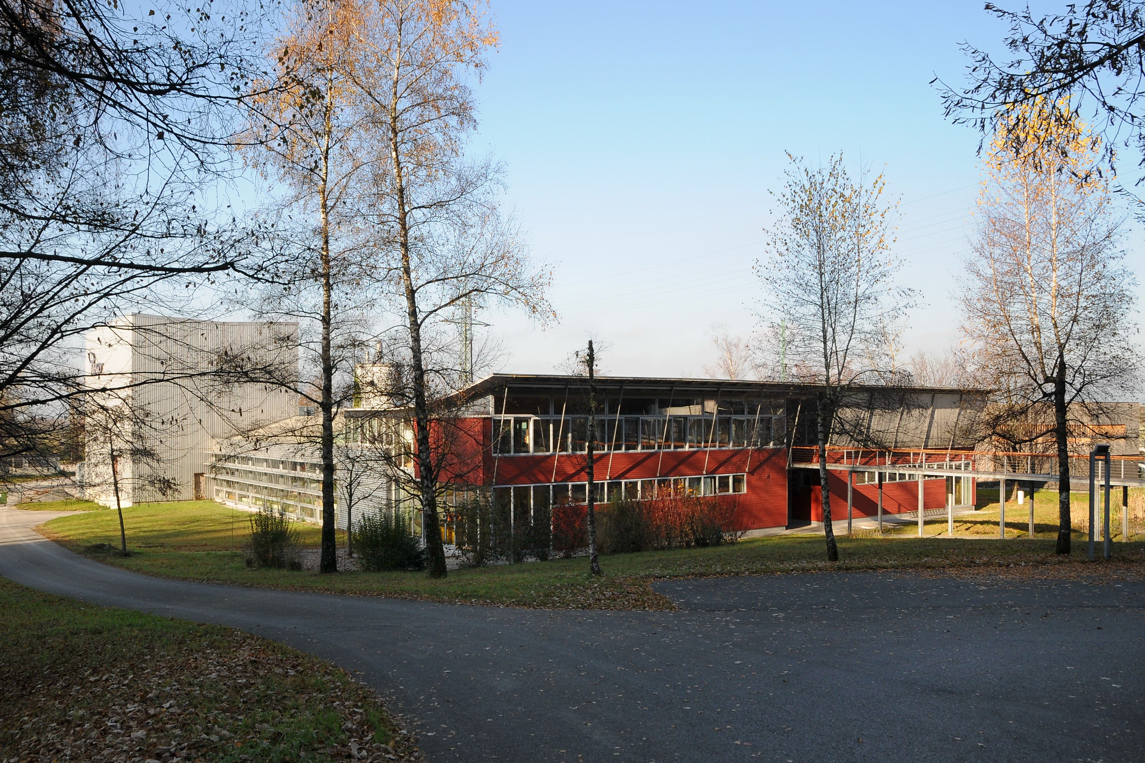 das Verwaltungs- und Produktionsgebäude der Rieger Orgelbau in Schwarzach, Vorarlberg. Rieger Orgelbau ist eine österreichische Orgelbaufirma, die auf das 1845 in Jägerndorf (Österreichisch-Schlesien) von Franz Rieger gegründete Unternehmen zurückgeht. Sie hat seit 1946 ihren Sitz in Schwarzach, Vorarlberg, während in Krnov das Unternehmen Rieger-Kloss ebenfalls weiter Orgeln fertigt.